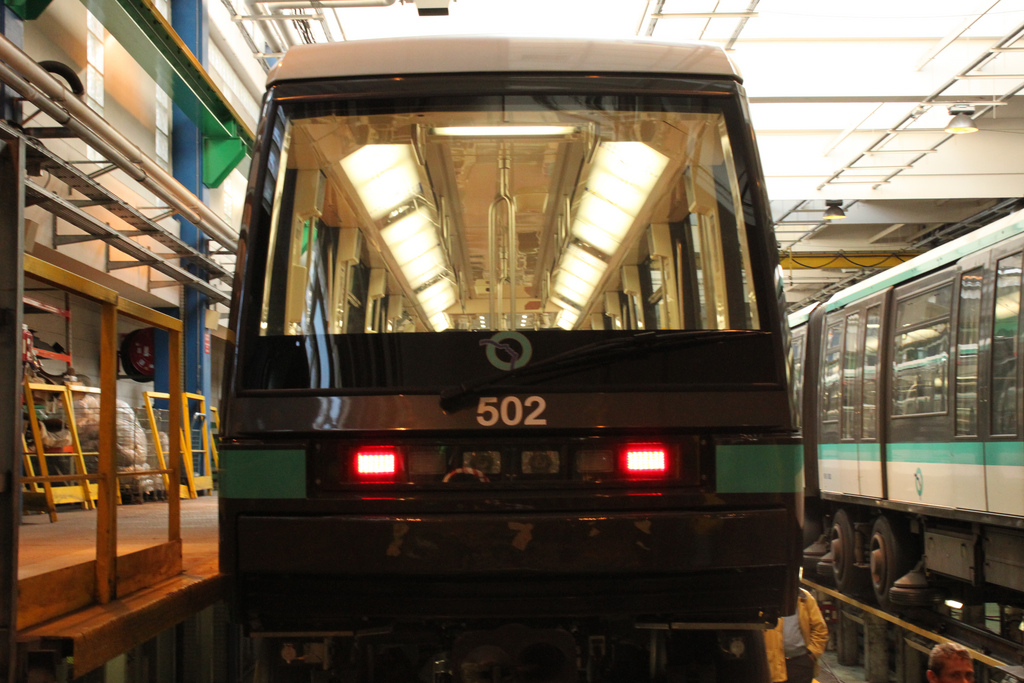 Un train MP 05 aux ateliers de Fontenay